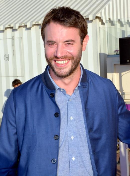 Yaniss Lespert au festival de Cabourg